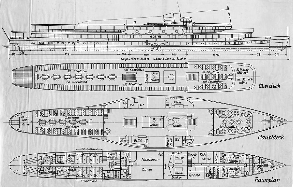 Deckplan des Raddampfers Goethe (Wiederaufbau 1952/53)